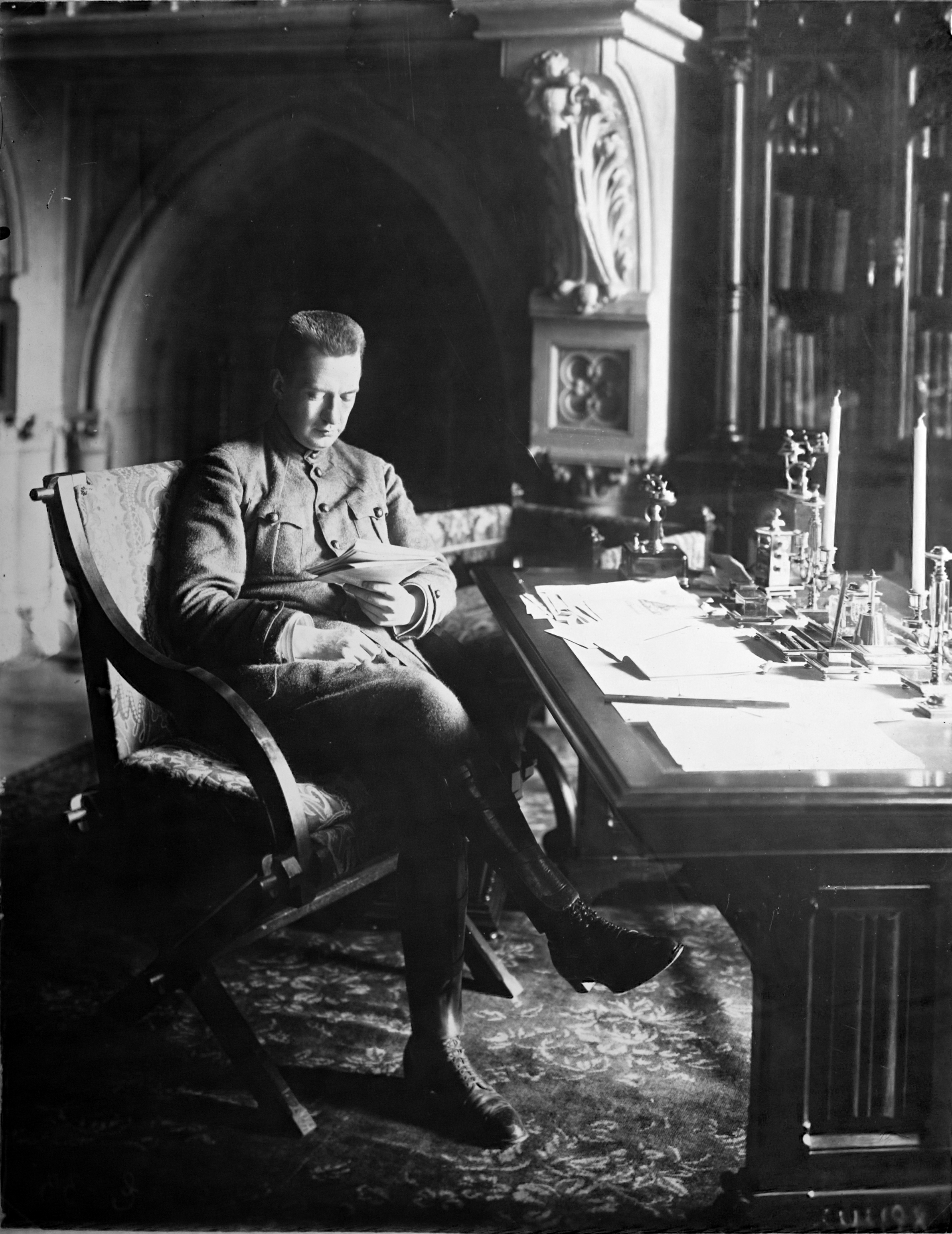 Керенский А.Ф. в своём кабинете в Зимнем дворце. Фото 1917 года.